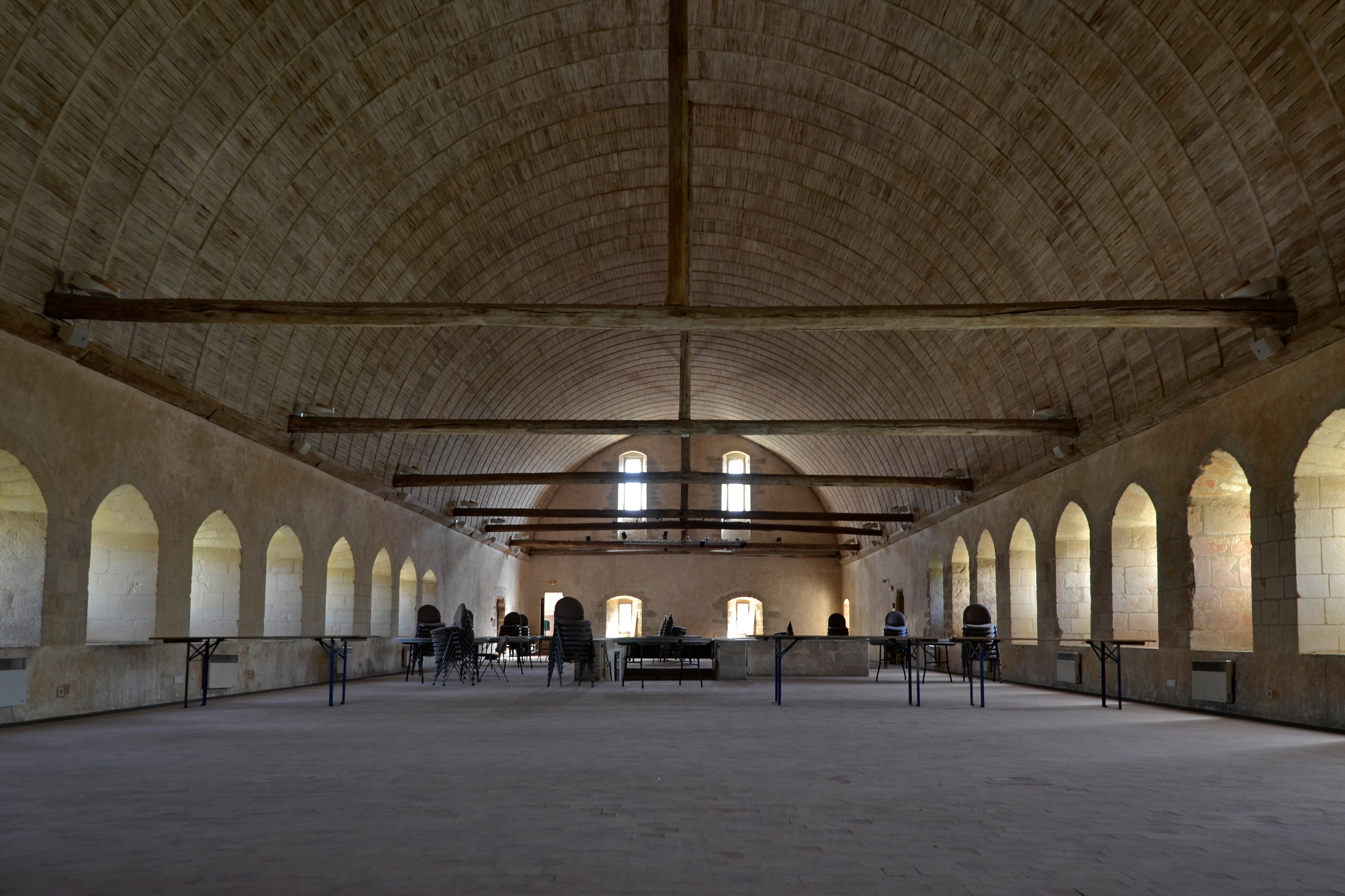 Abbaye de l'Épau - Yvré-l'Évêque, Sarthe .